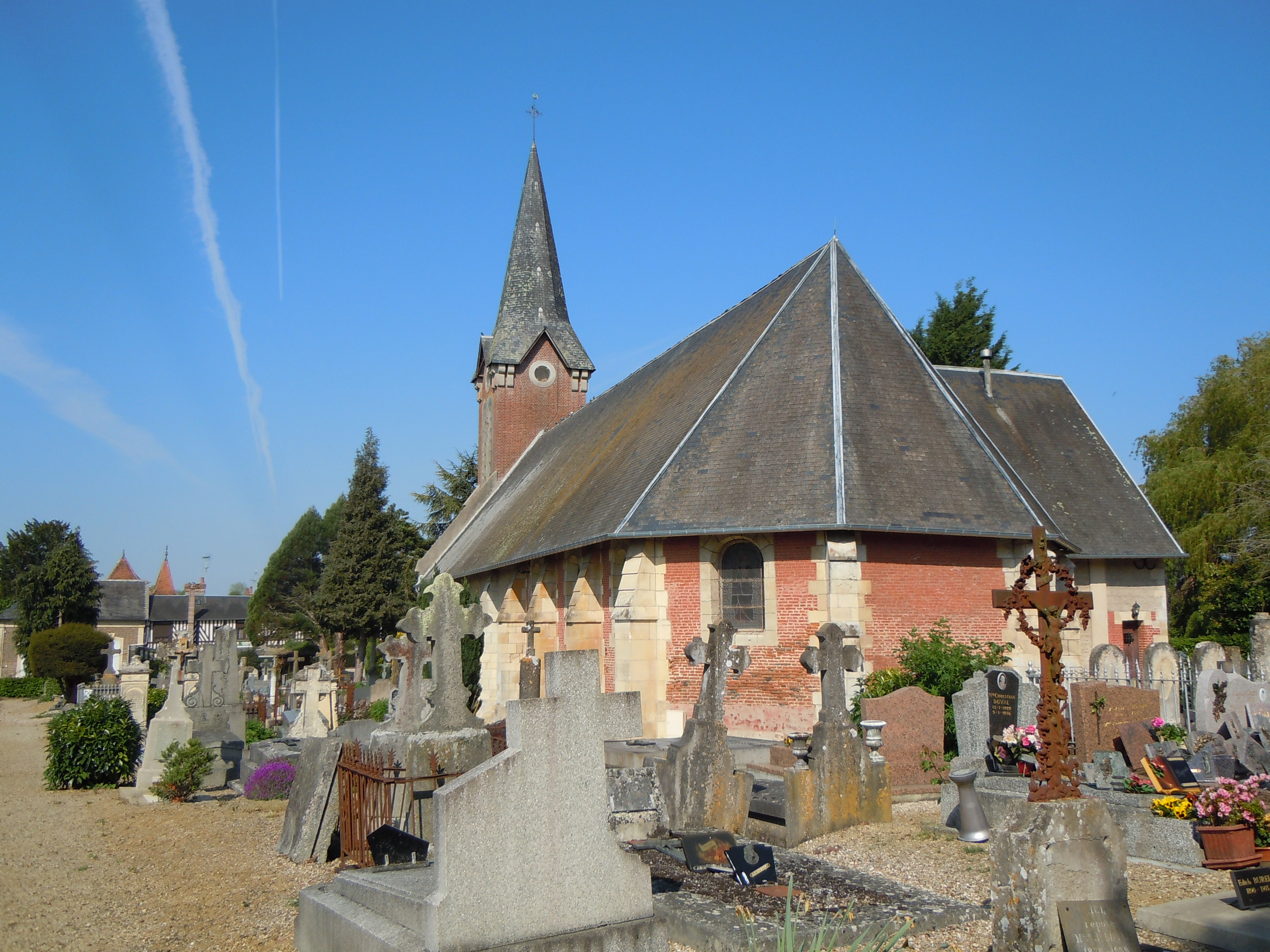 Beuvron en Auge - Eglise Saint Martin - Calvados - France